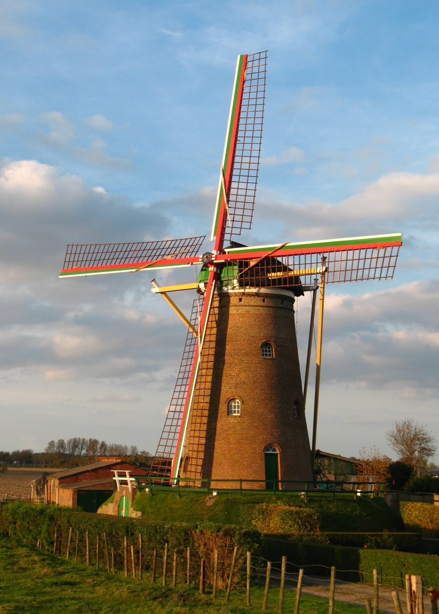 Zuidzandse molen, Zuidzande, Zeeland, beltmolen